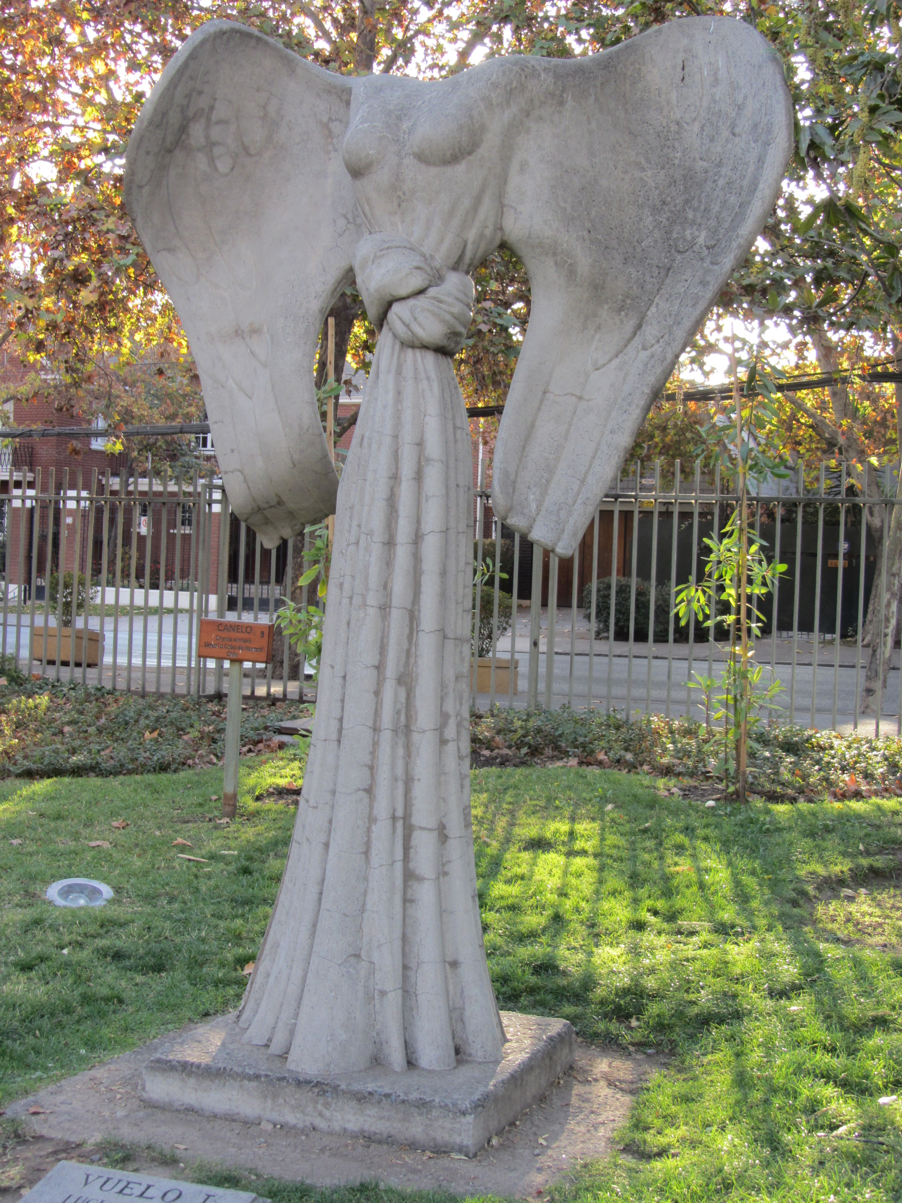 Vuelo I, de la escultora chilena Lucía Waiser; Parque de las Esculturas de Providencia, Santiago de Chile.